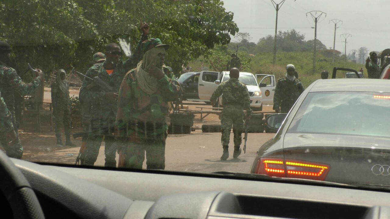 Les mutins ont investi les rues de Yamoussoukro, en Côte d'Ivoire, le 17 janvier 2017. (VOA/Yvon Coulibaly)